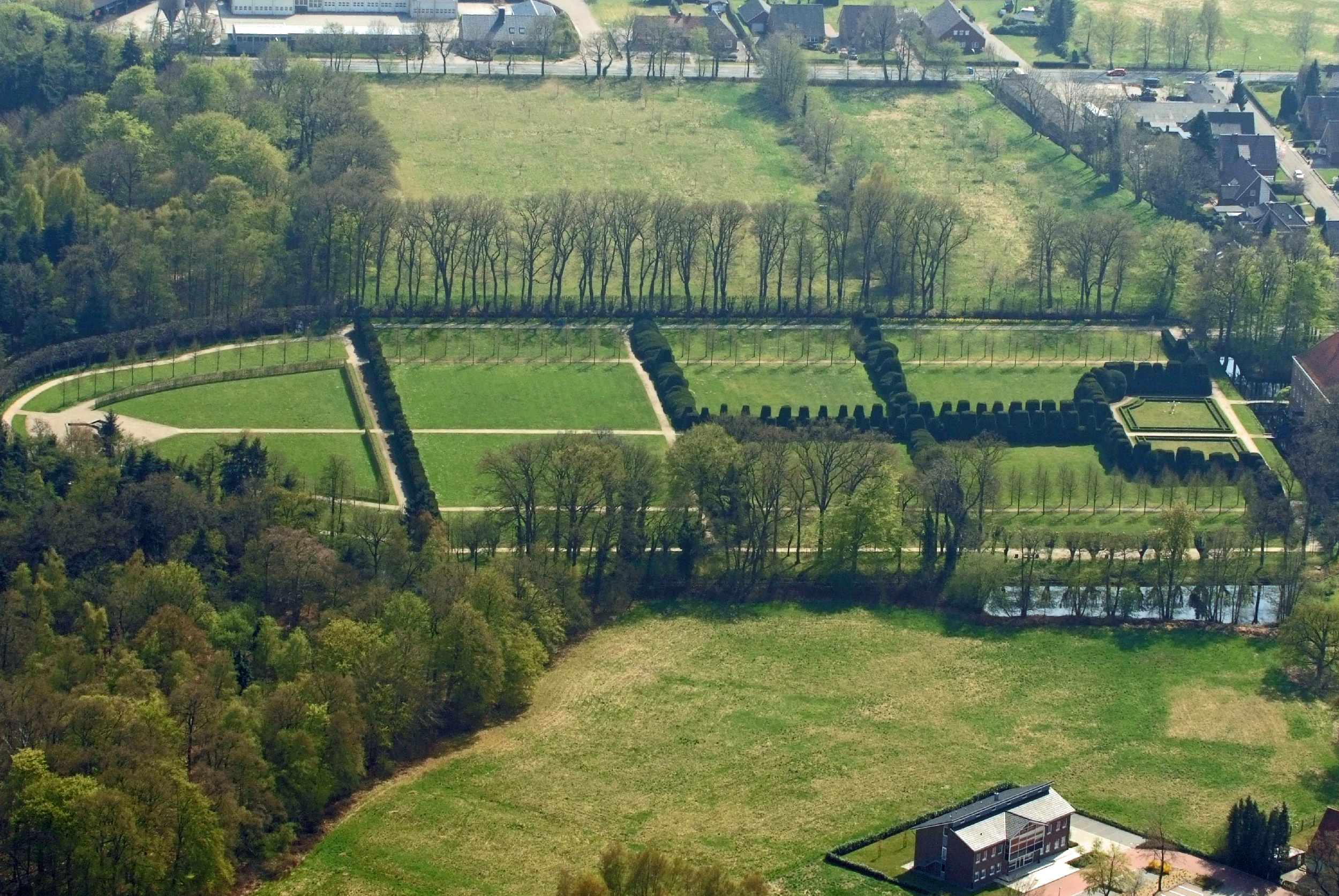 Gartenanlage Gut Altenkamp, Aschendorf (Papenburg) / Fotoflug von Nordholz-Spieka nach Oldenburg und Papenburg